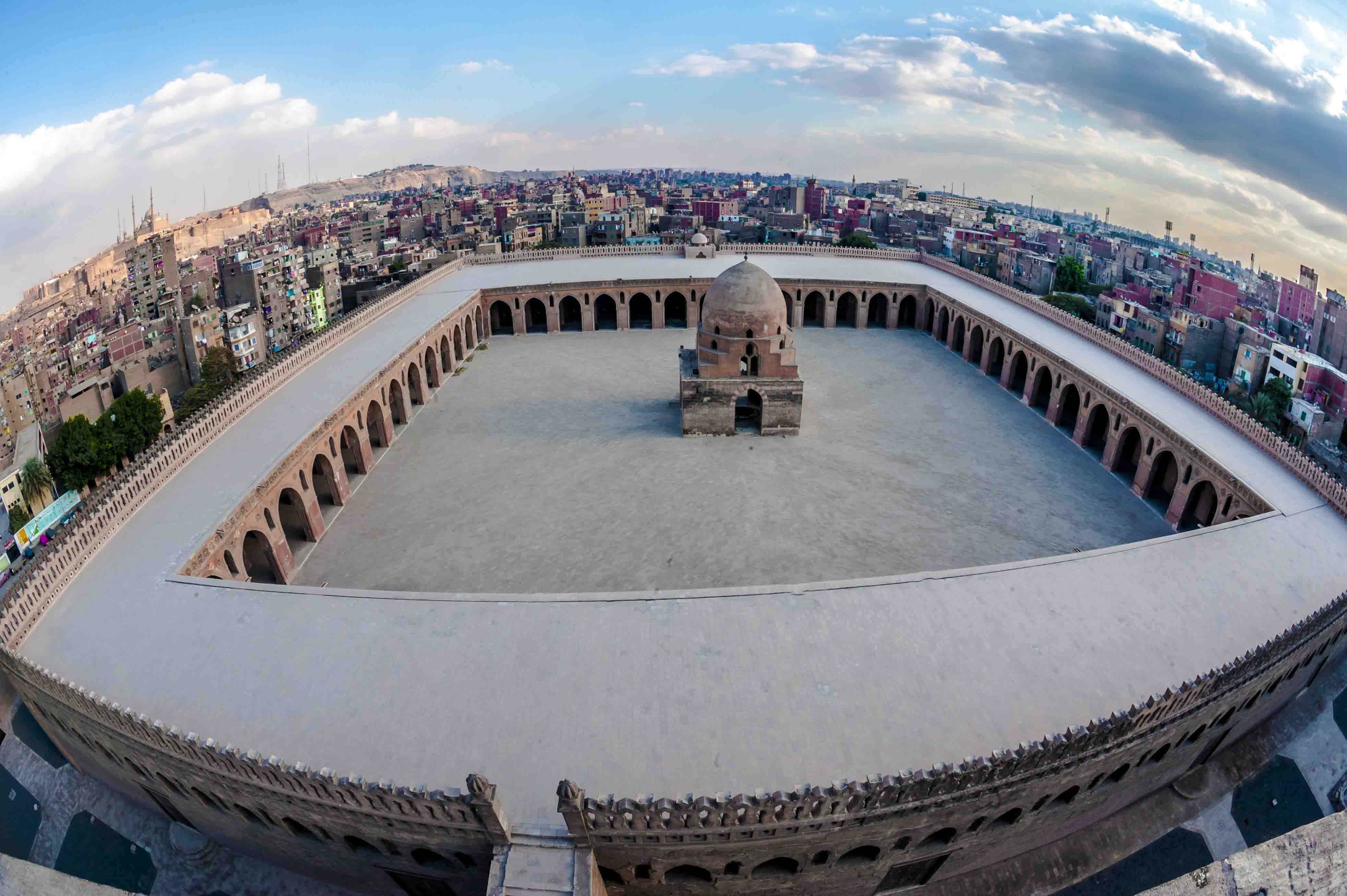 لقطة لجامع ابن طولون من داخل المأذنة